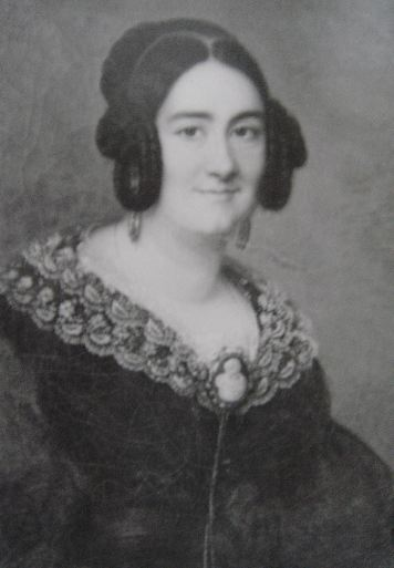 Mme Eglé Rostand-Jourdan (1797-1862)